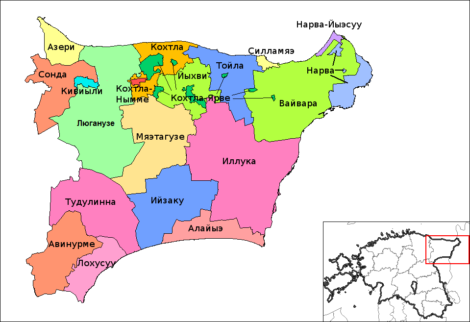 Перевод карты File:Ida-Viru_municipalities.png на русский язык